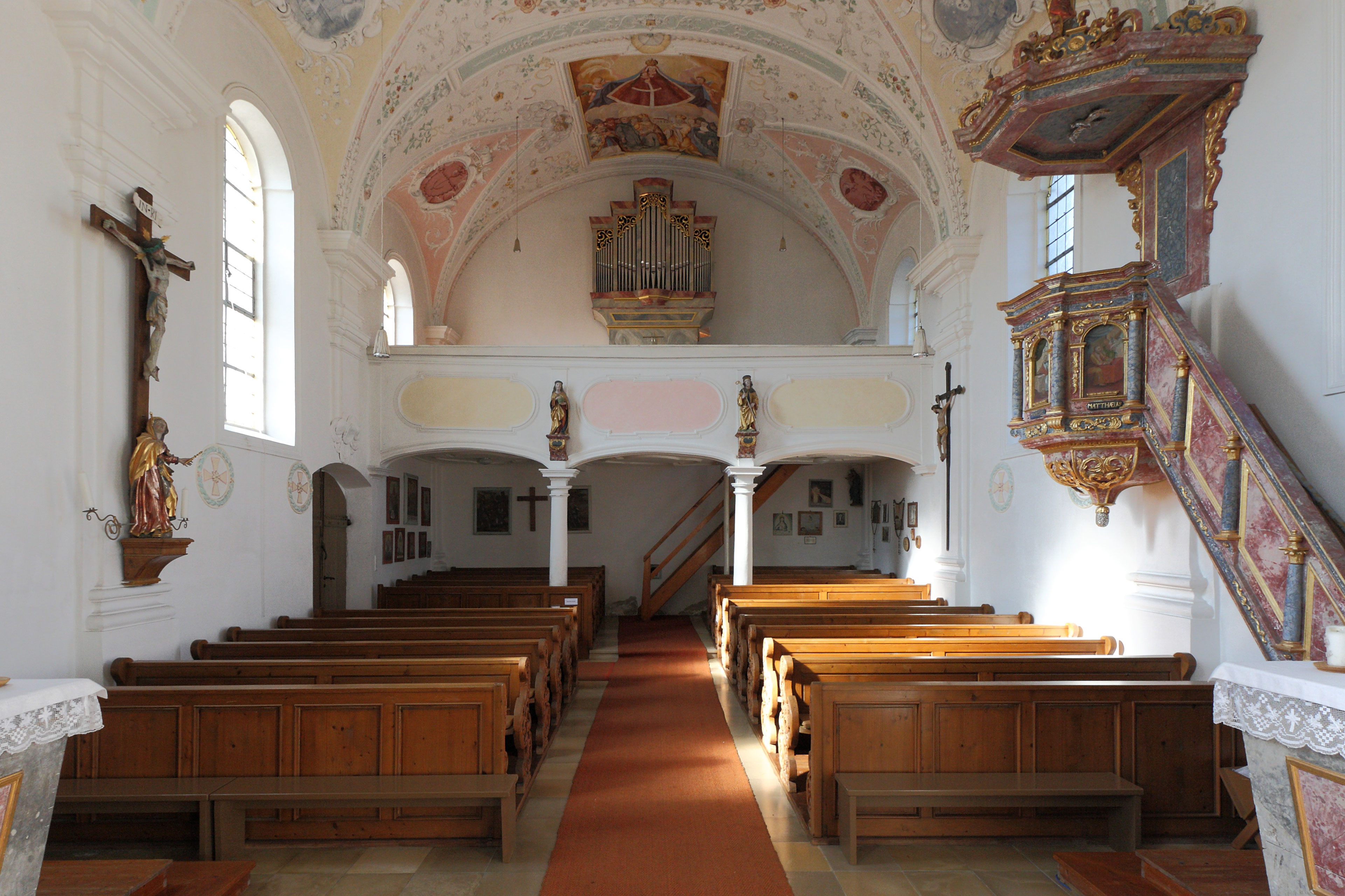 Kath. Filialkirche St. Maria in Neuhäder, Gemeinde Dinkelscherben; Blick zur Empore